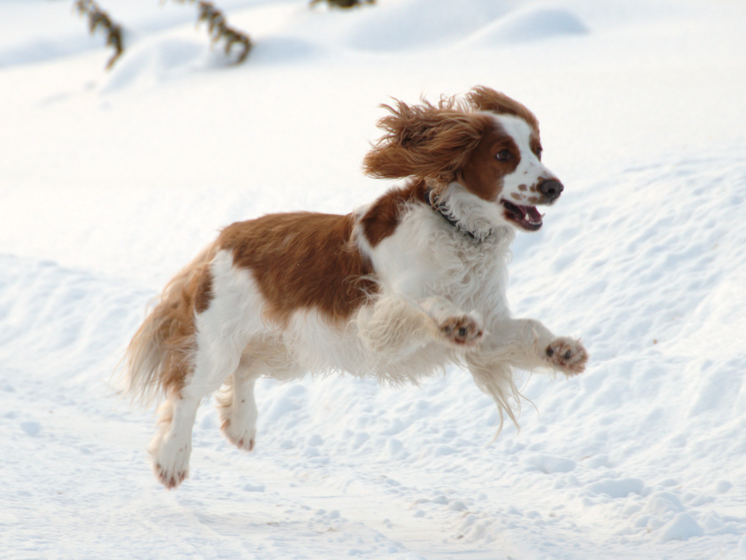 Welsh Springer Spaniel